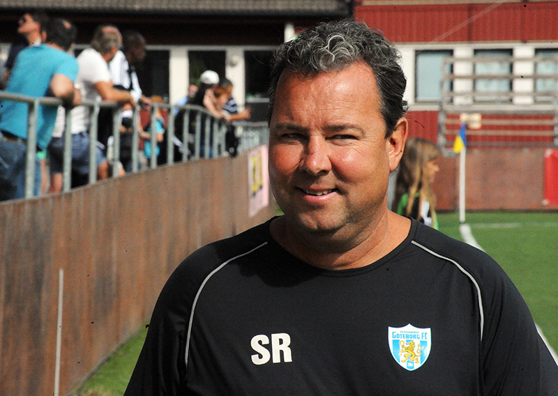 Stefan Rehn (Kopparbergs/Göteborg FC)